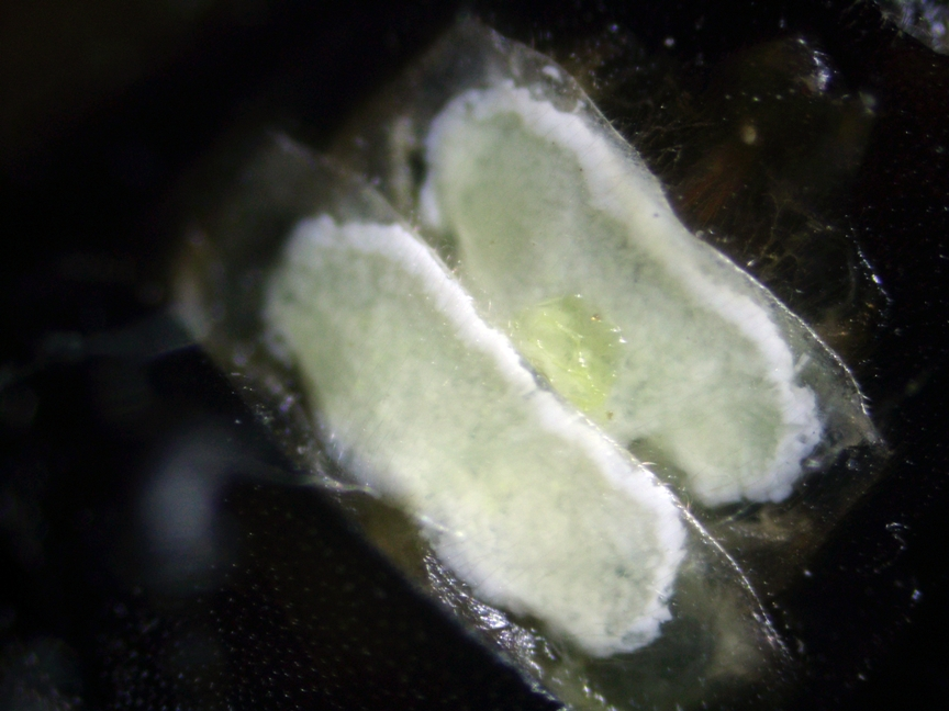 Lampyris noctiluca